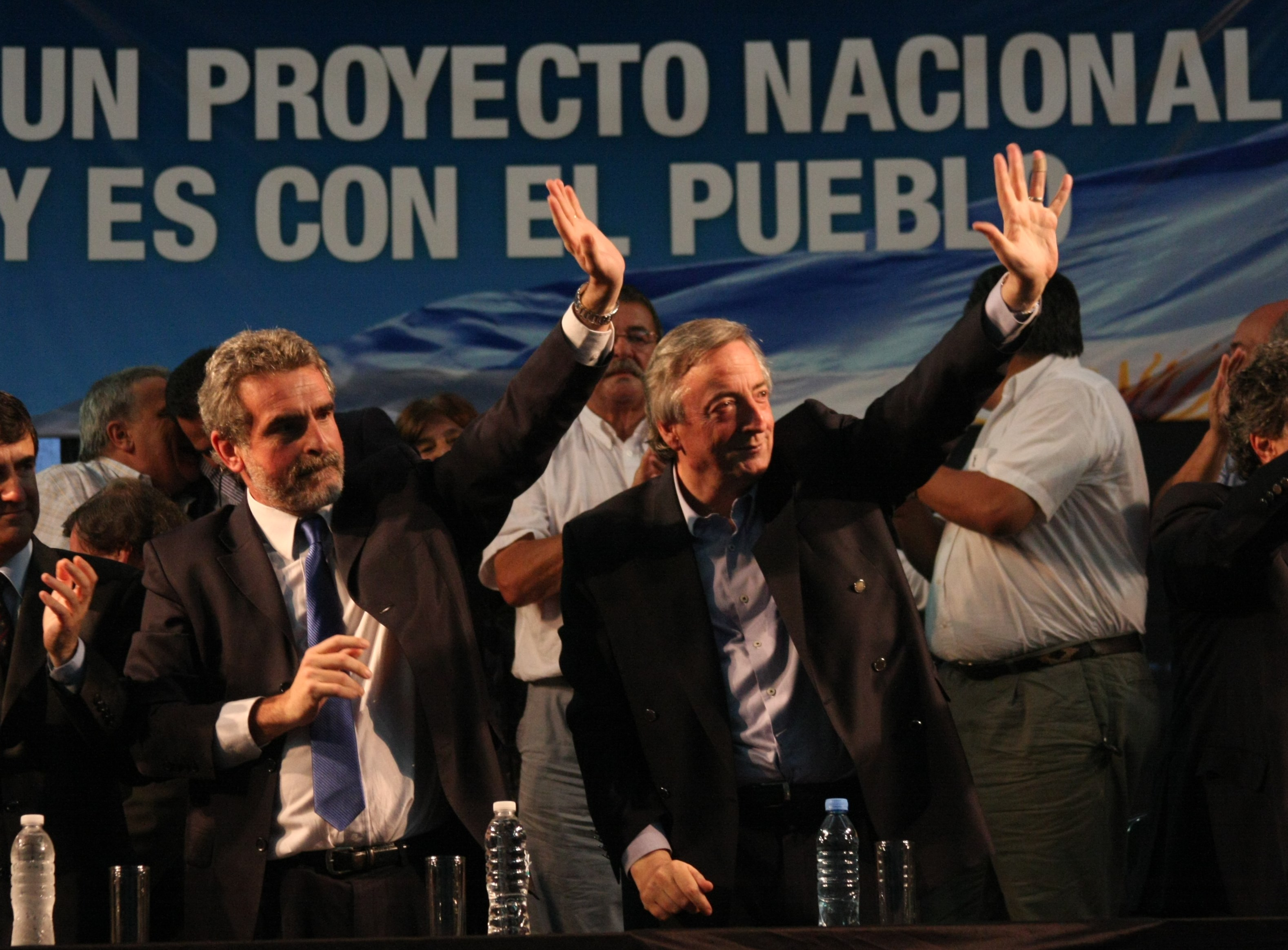 Agustin Rossi y Nestor Kirchner